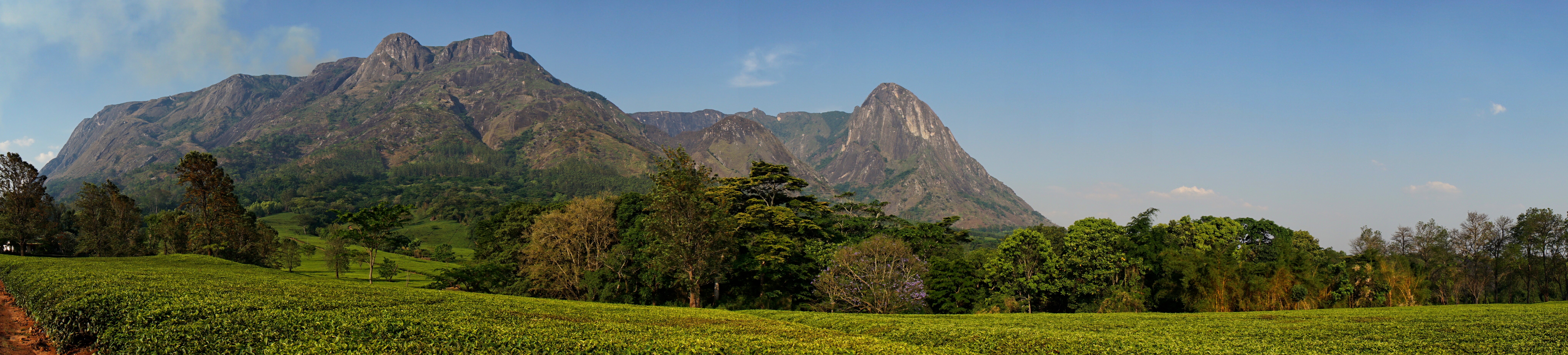 Mount Mulanje